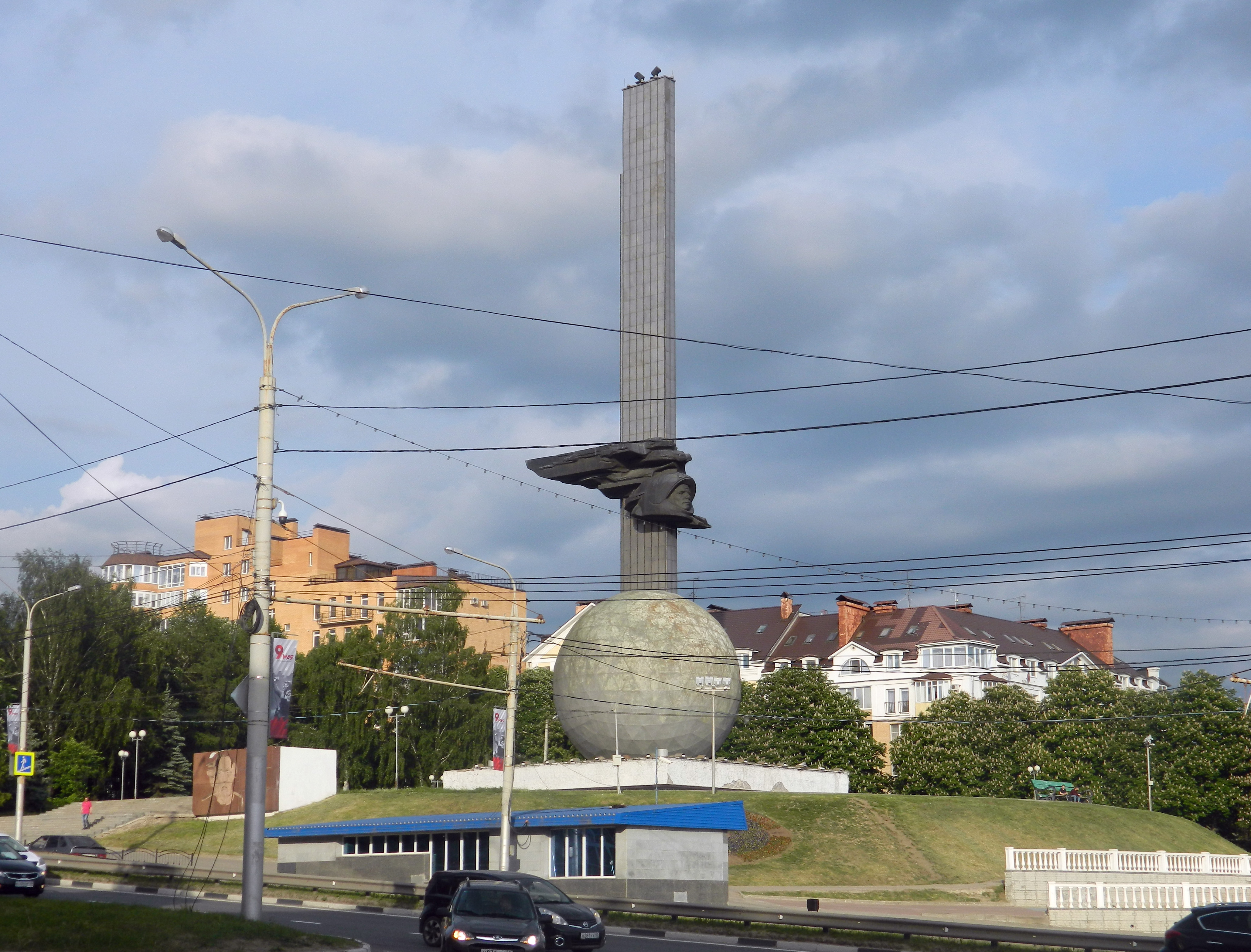 Так называемый, шарик, находящийся на въезде в город